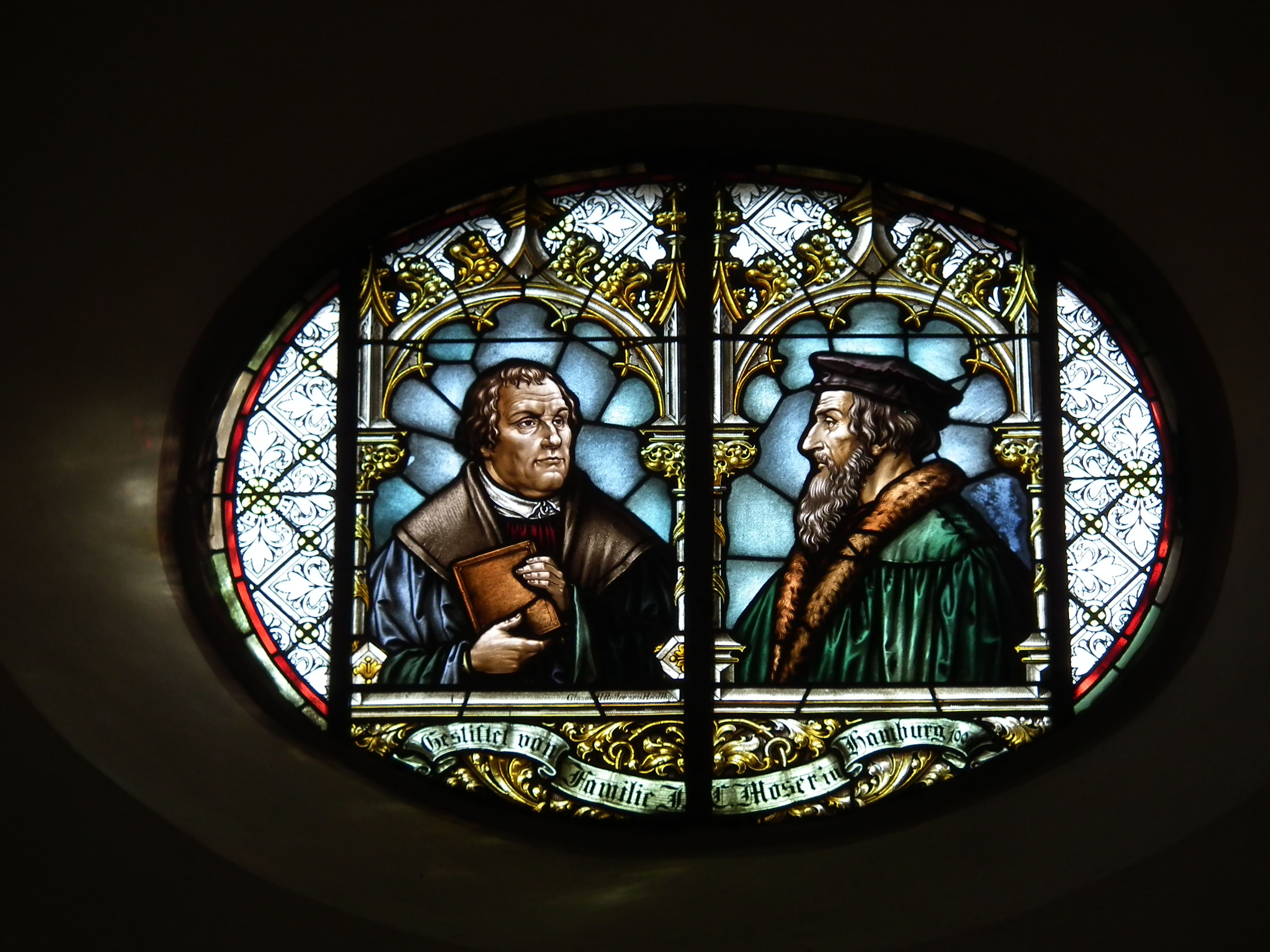 Darstellung von Luther und Calvin in einem Kirchenfenster der evangelischen Stadtkirche in Wiesloch (Baden-Württemberg, Deutschland)